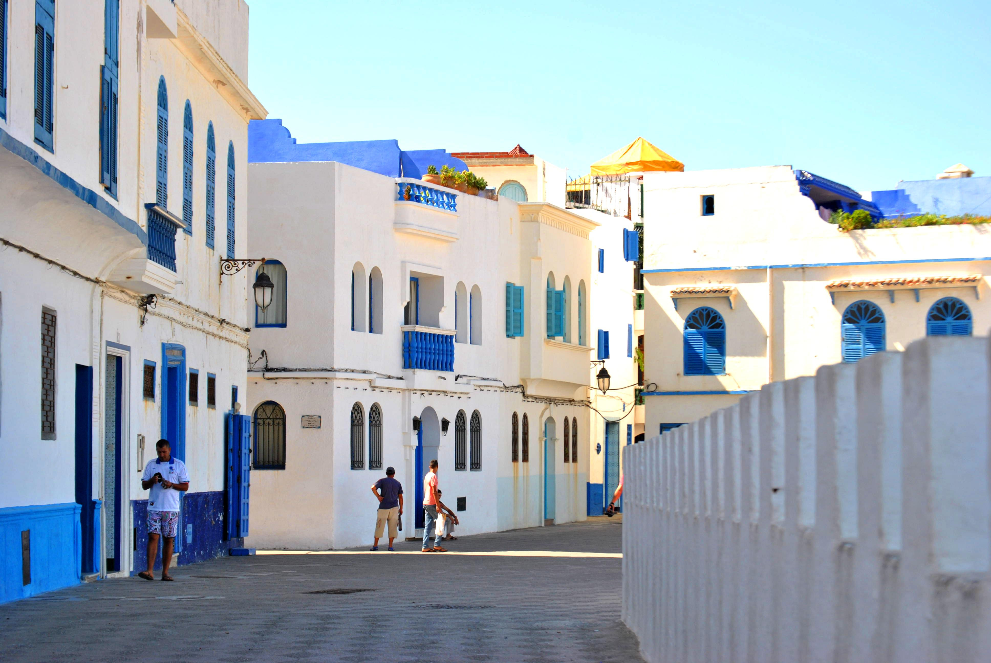 Front de mer à Assilah